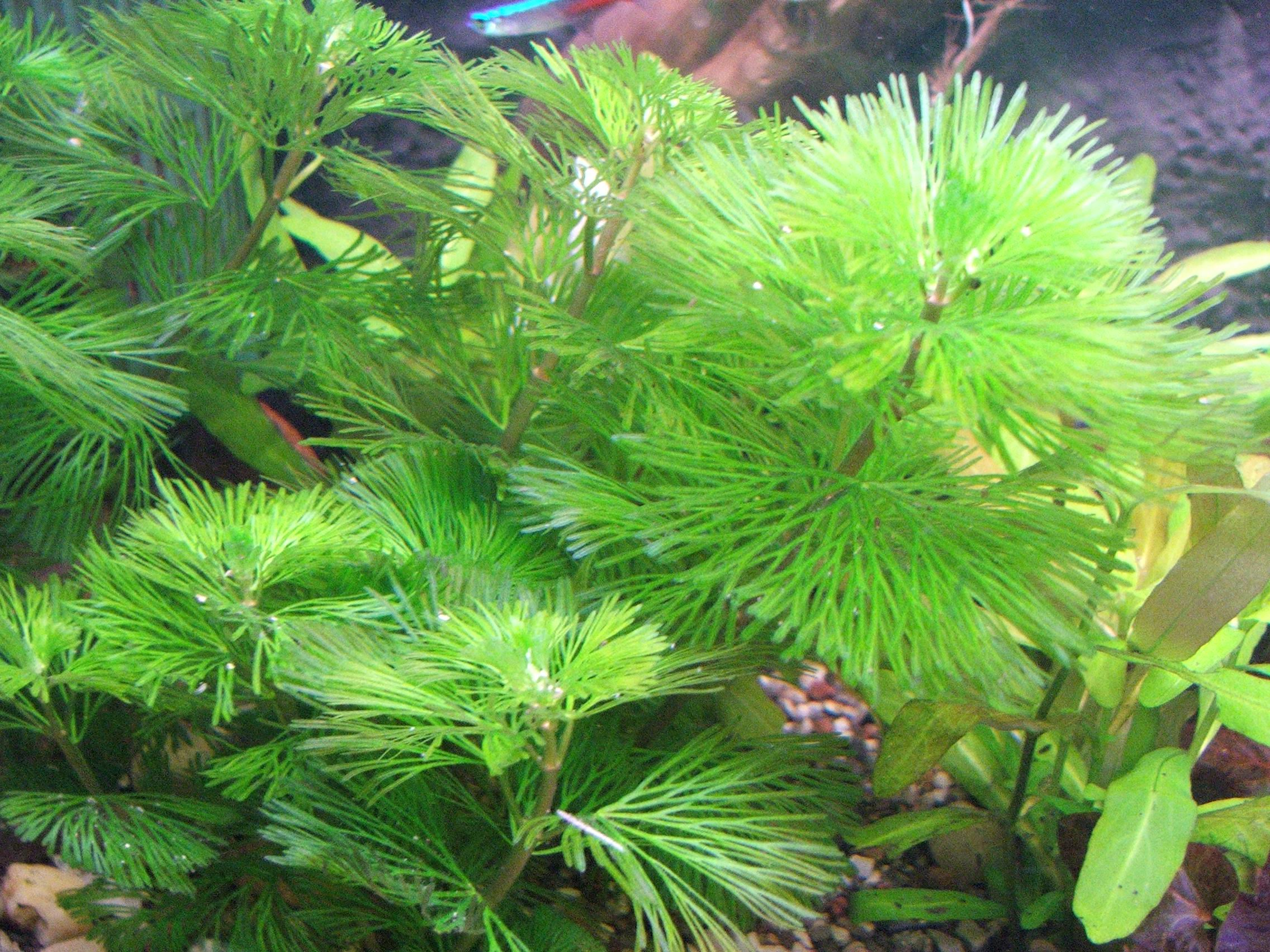 Category:Cabomba aquatica